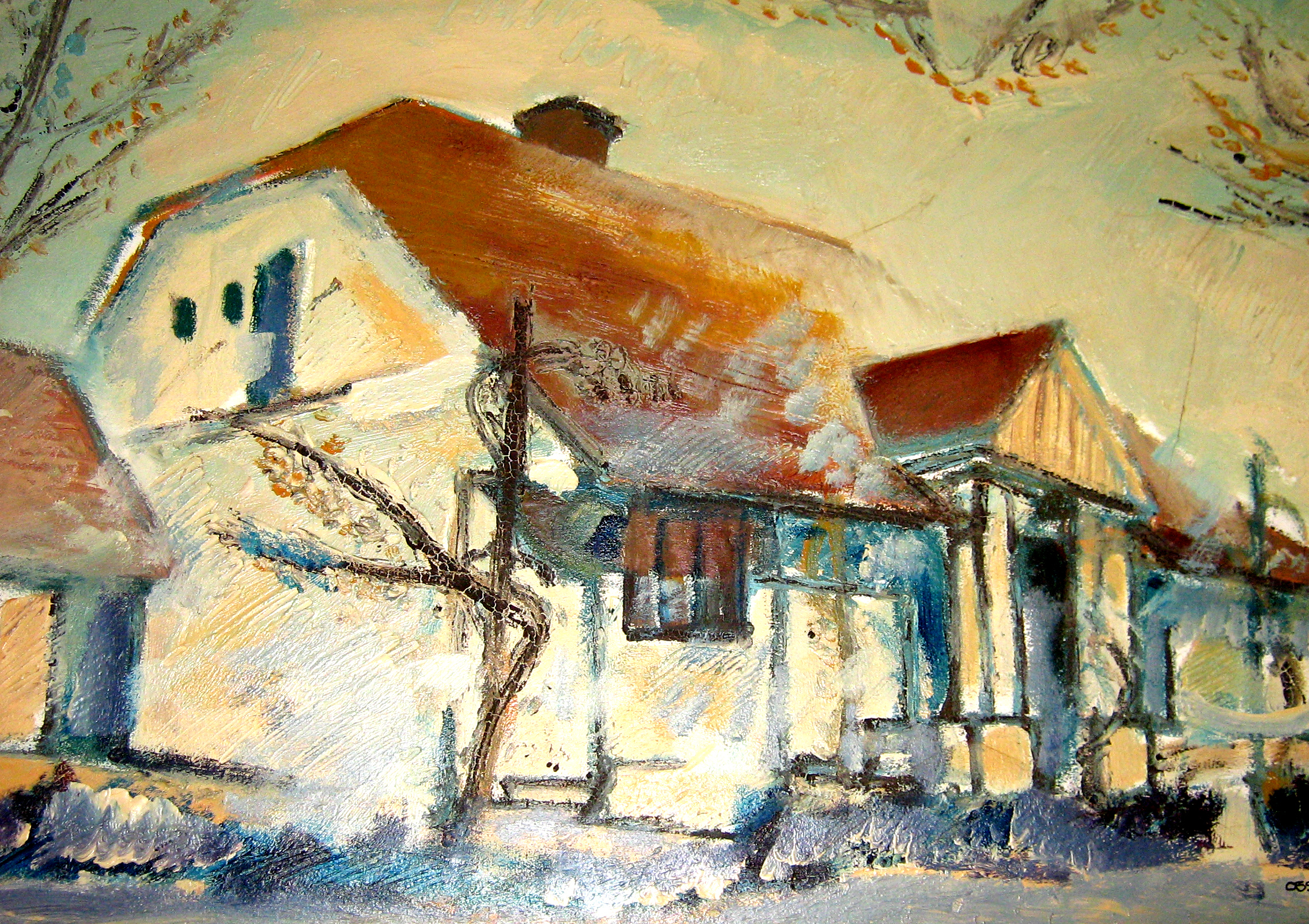 Prva Slovačka bogomolja u Kulpinu slika 50x70 u ulju 2001.god autor: self-made- Vcesnak